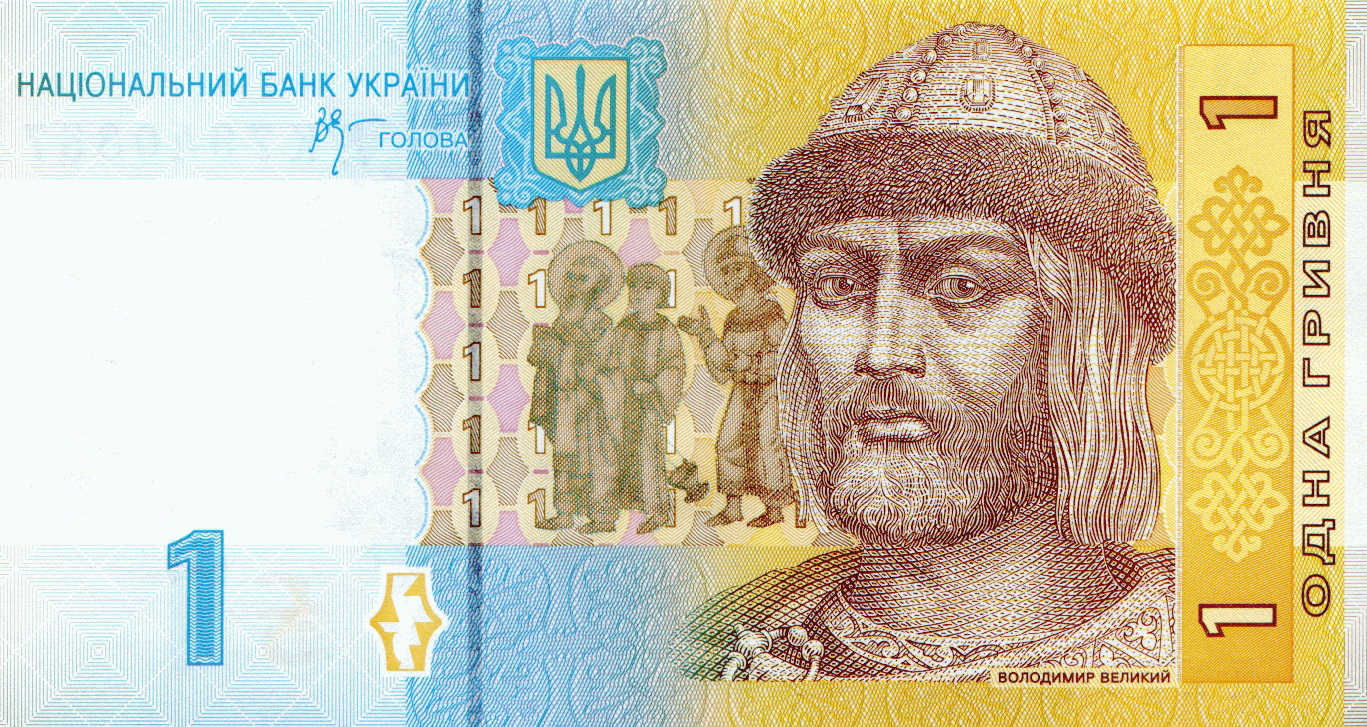 Зразок гривні 2006-ого року випуску